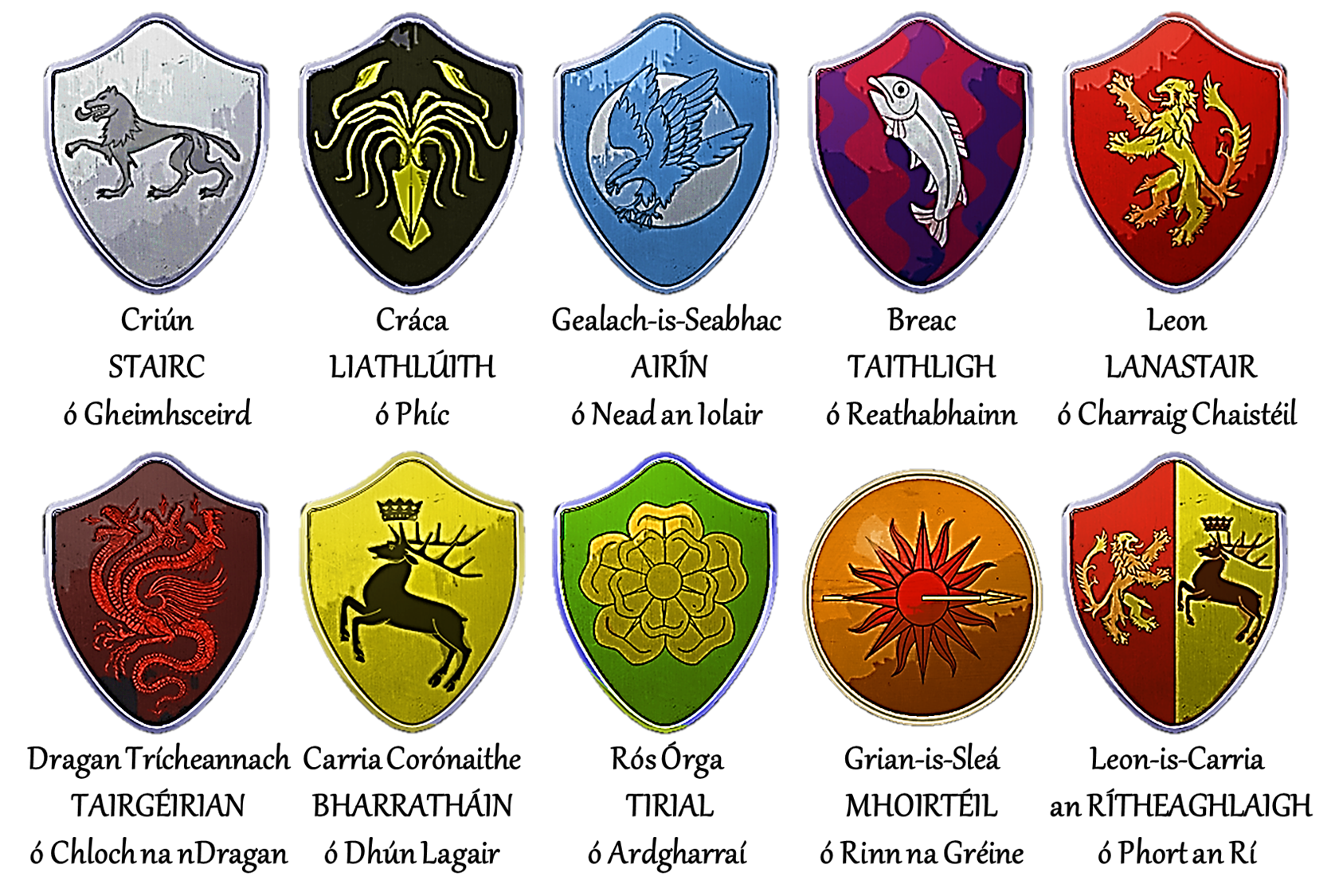 Suaitheantais Mhórtheaghlaigh Iartharais